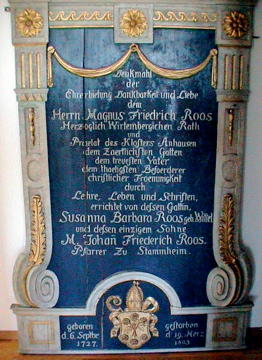 Epitaph im Chor der Stadtkirche Sulz am Neckar über Magnus Friedrich Roos (1727-1803)